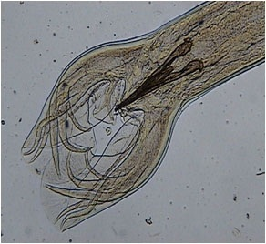 Vista ventral de la bolsa de un macho de Haemonchus placei(Microscopio óptico 40 aumentos)